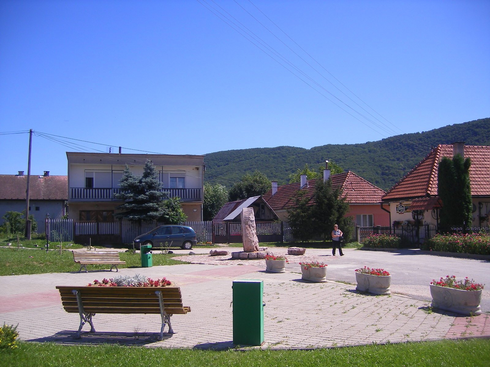 Jólész